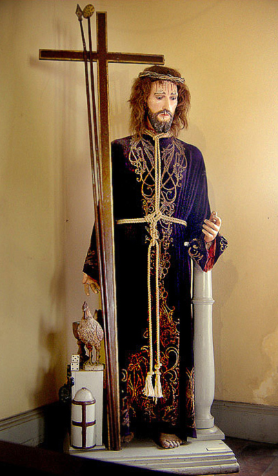 Cristo flagelado e escarnecido, imagem de roca pertencente ao Museu de Arte Sacra de Pernambuco, Olinda, Pernambuco, Brasil.